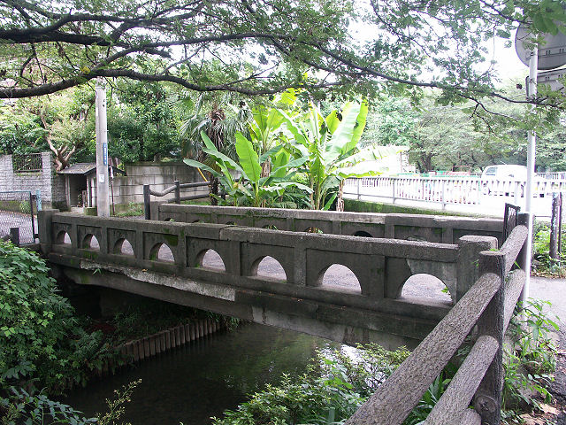 宿河原用水・船島橋 撮影日：2006年 7月06日 撮影地：二ヶ領用水・船島橋（神奈川県川崎市多摩区宿河原） 撮影者：cory Nikaryo-yosui Funeshima bridge. Date: 2006-07-06 (Jul 06, 2006) Place: Nikaryo-yosui Funeshima bridge, Shukugawara Tama Kawasaki Kanagawa, Japan. Author: ISAKA Yoji (cory)